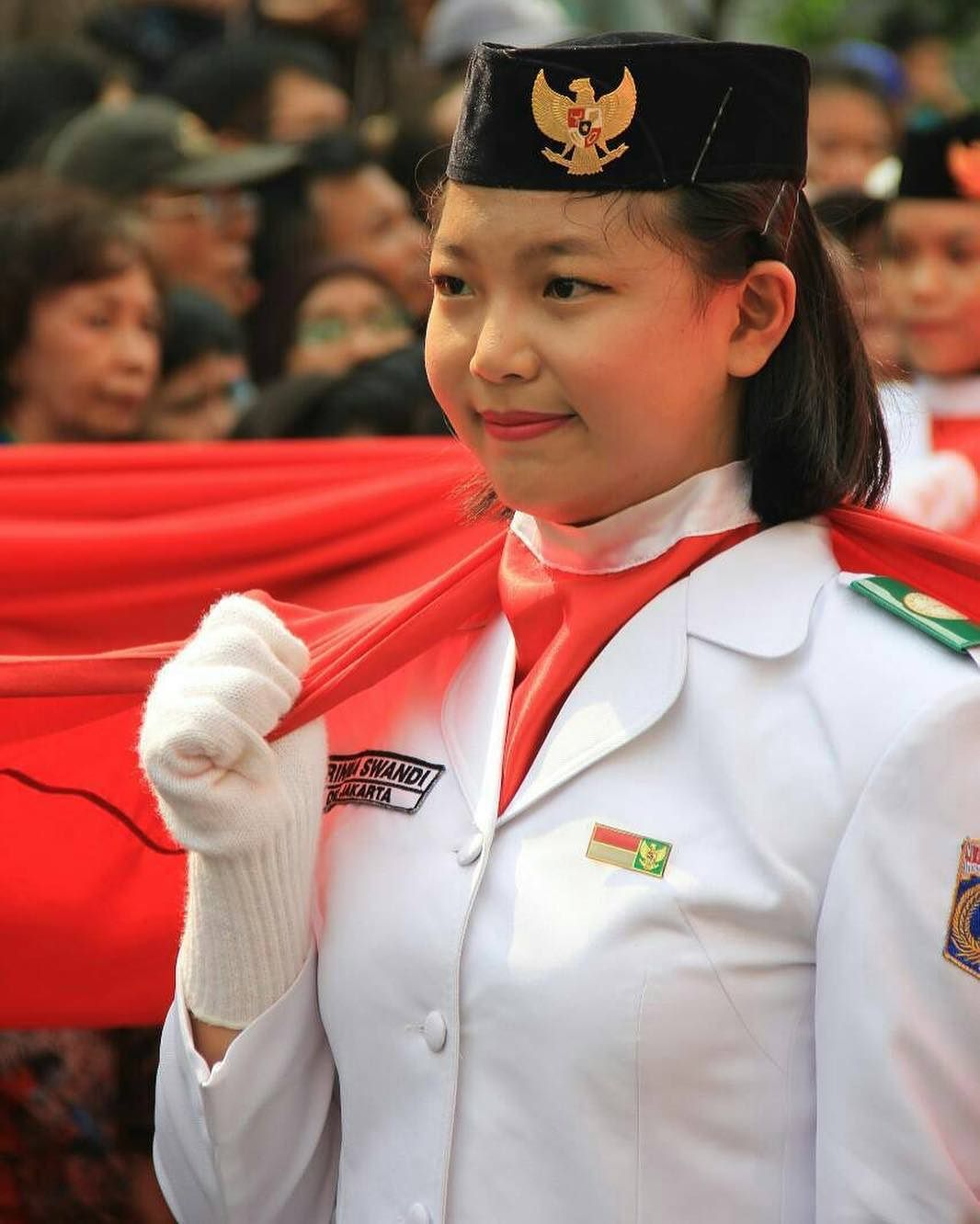 Seorang Paskibraka di acara Cap Go Meh 2016